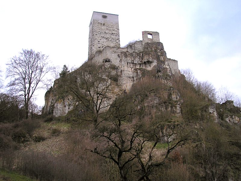 Die Burg auf dem Jurafelsen